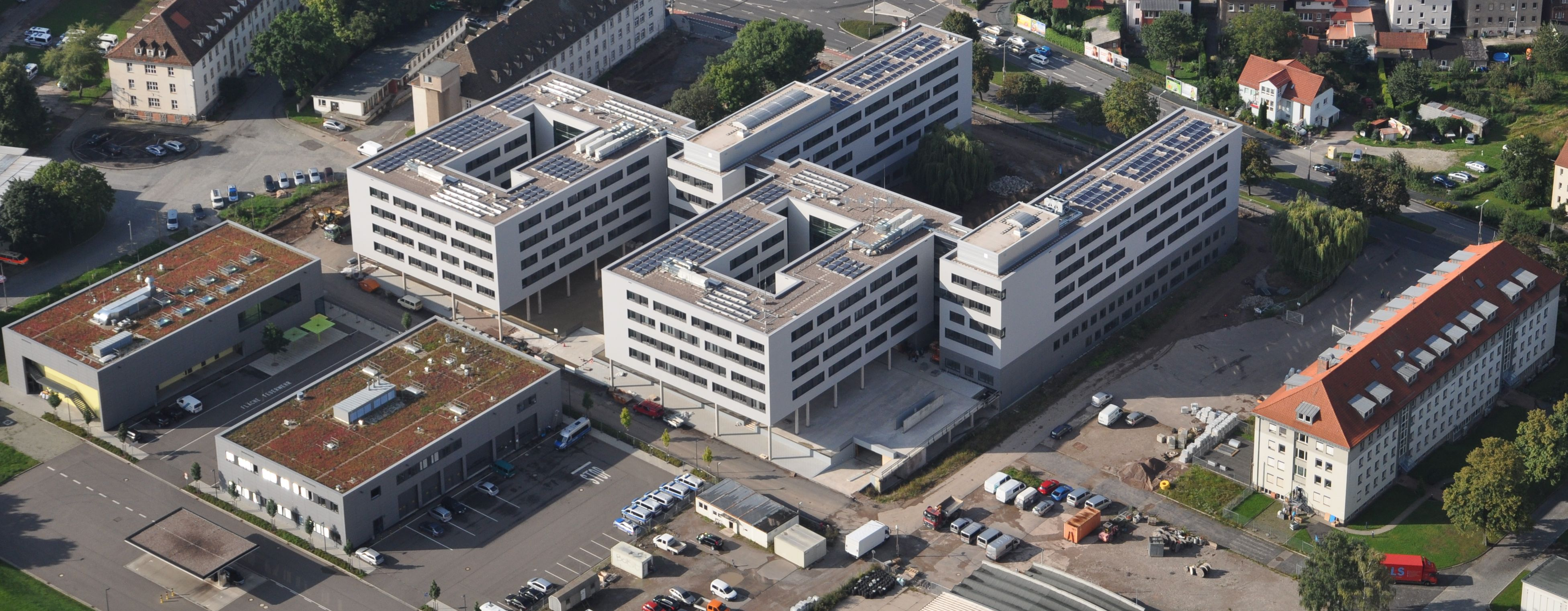 Übersichtsaufnahme vom Neubaukomplex für die Thüringer Behörden Landeskriminalamt und Bereitschaftspolizei in der Kranichfelder Straße in Erfurt/Deutschland